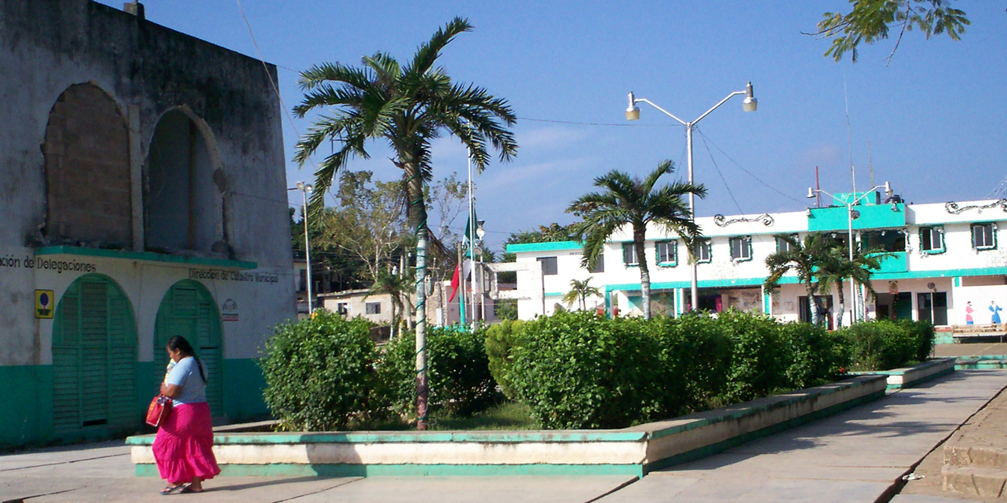 Plaza principal de Kantunil Kin en Quintana Roo (México)